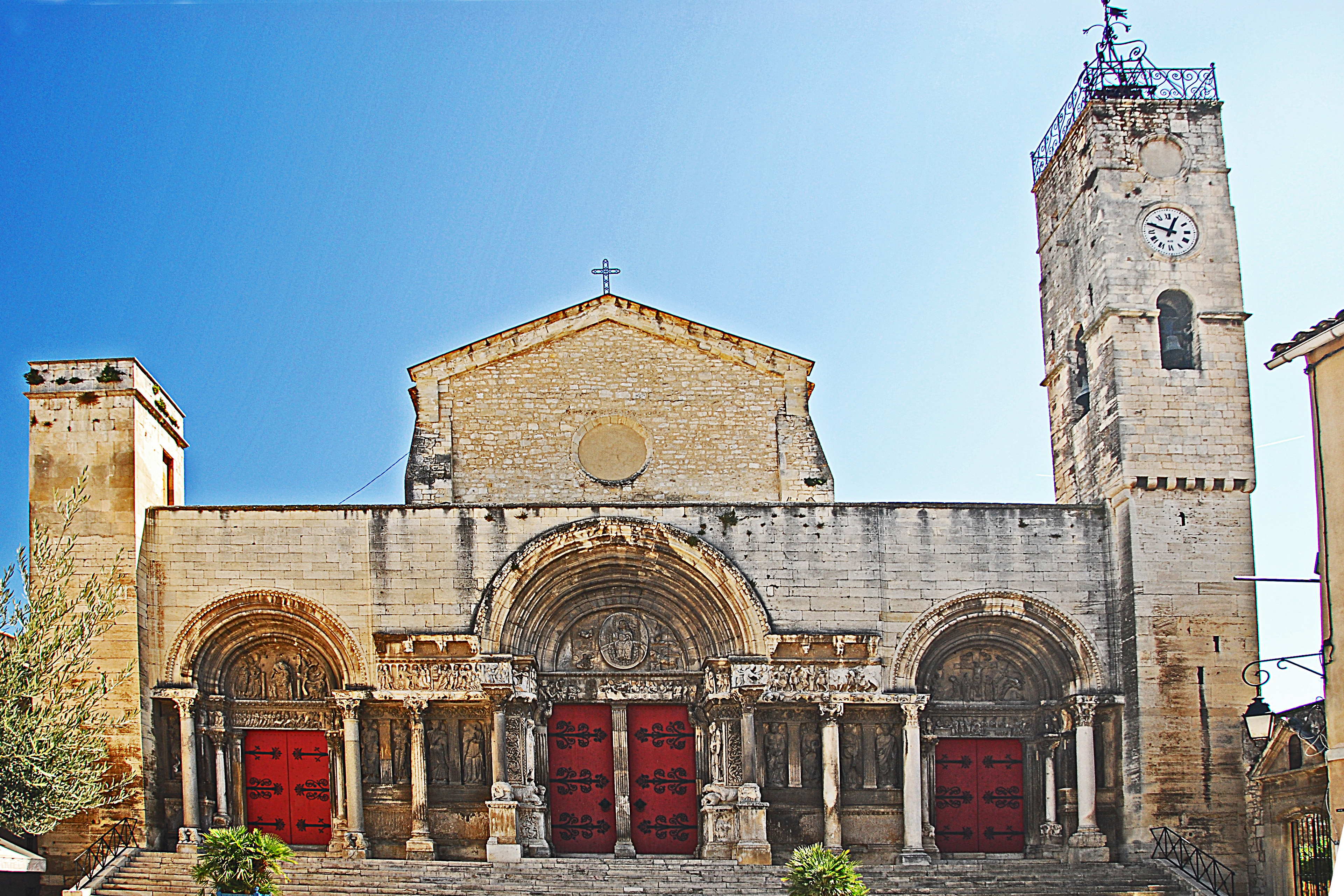 Abteikirche St-Gilles, Portalfassade von W